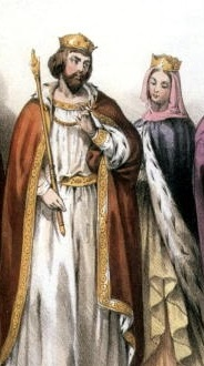 Dessin du roi Robert et de son épouse Constance.